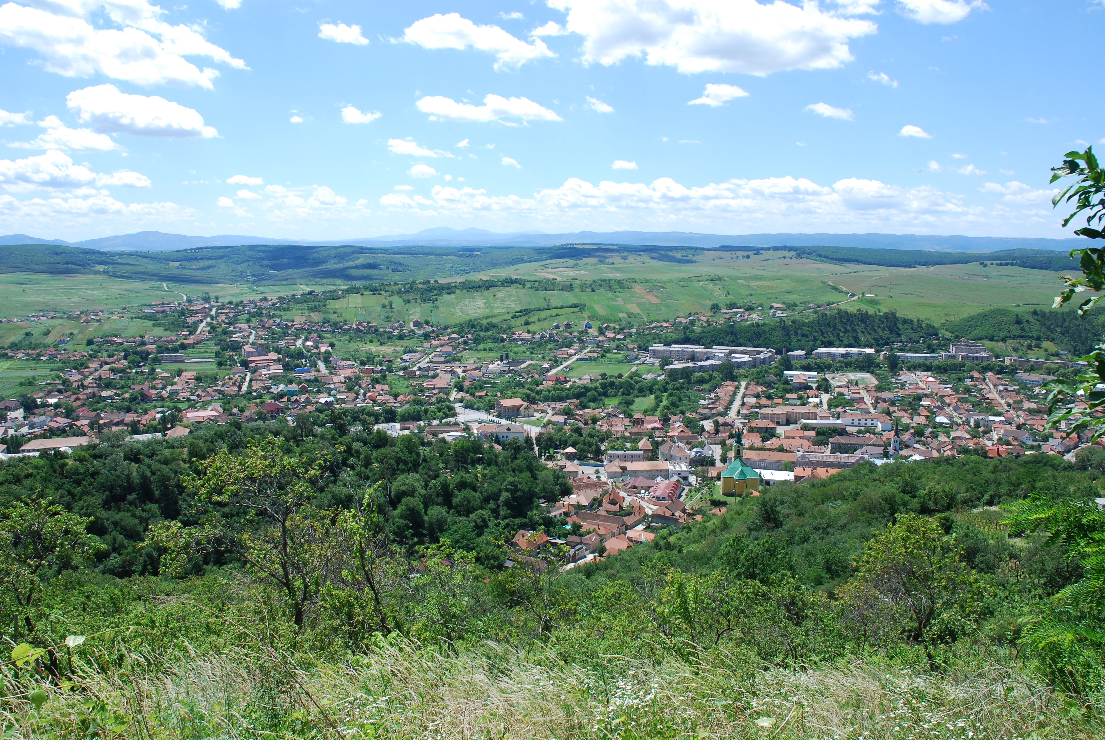 Simleu Silvaniei